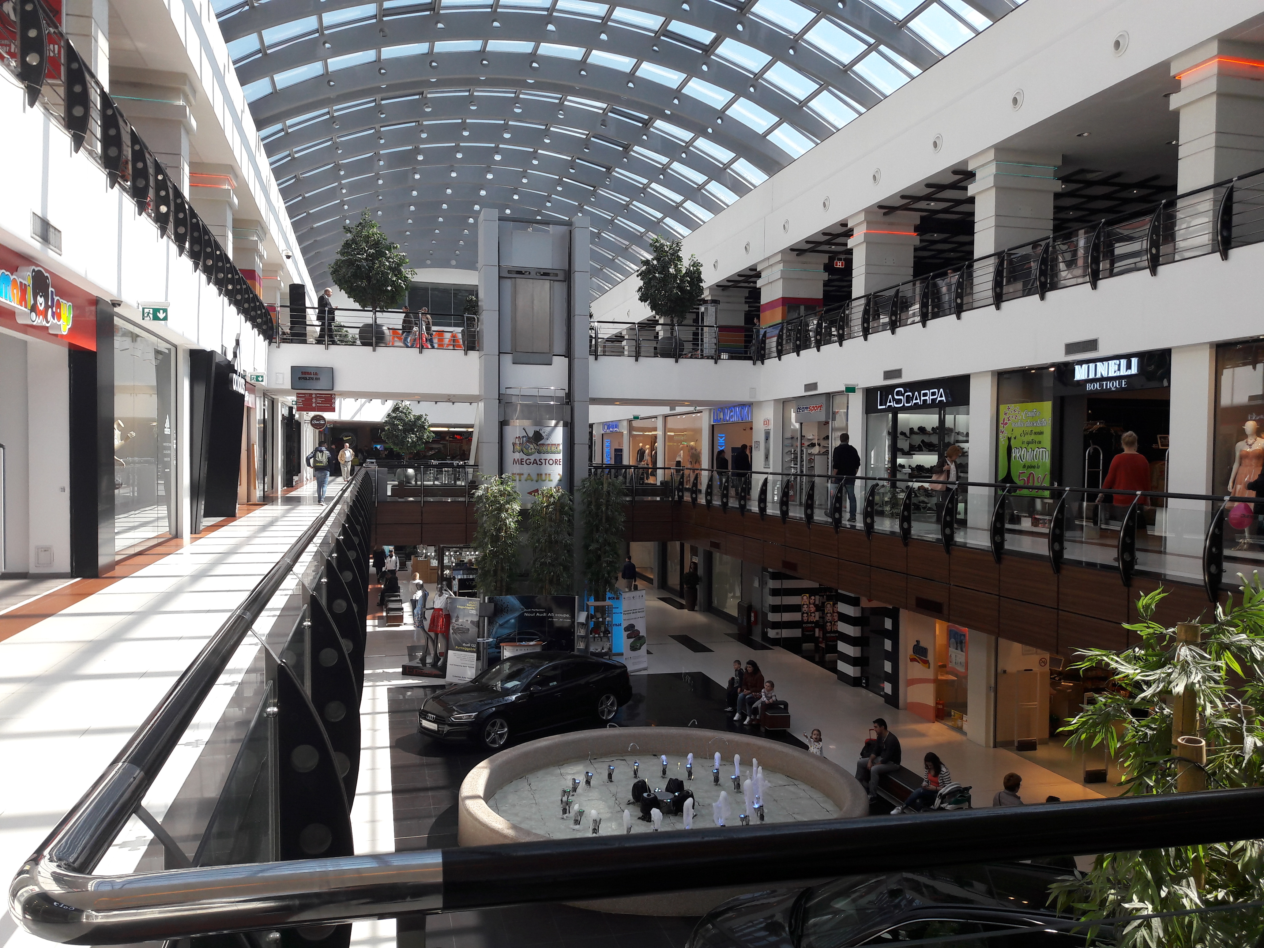 Interiorul Arena Mall, Primavara 2017.